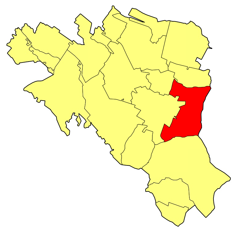 Położenie sołectwa Ostrzeszów-Pustkowie w gminie Ostrzeszów.